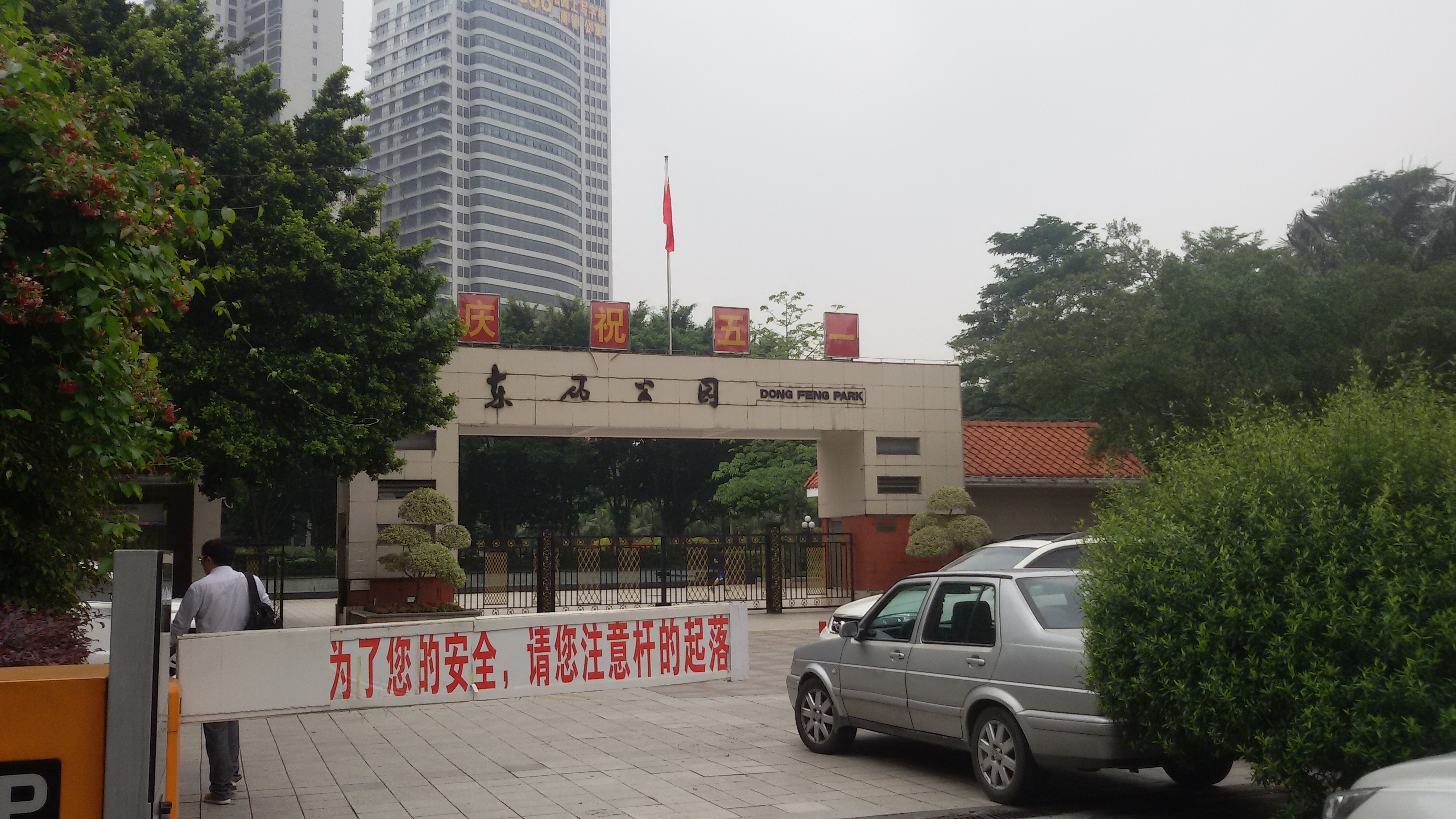 粵語: 廣州東風公園嘅正門